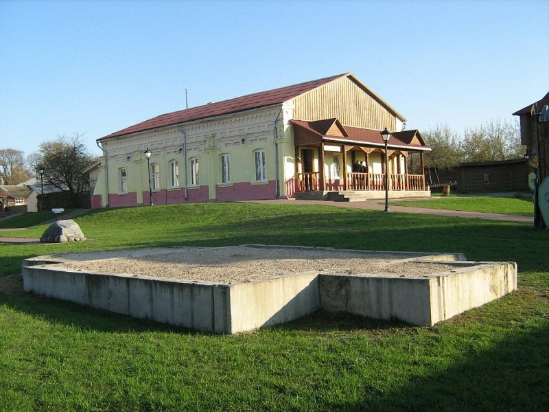 Мазыр. Вуліца Гора Камунараў, 1